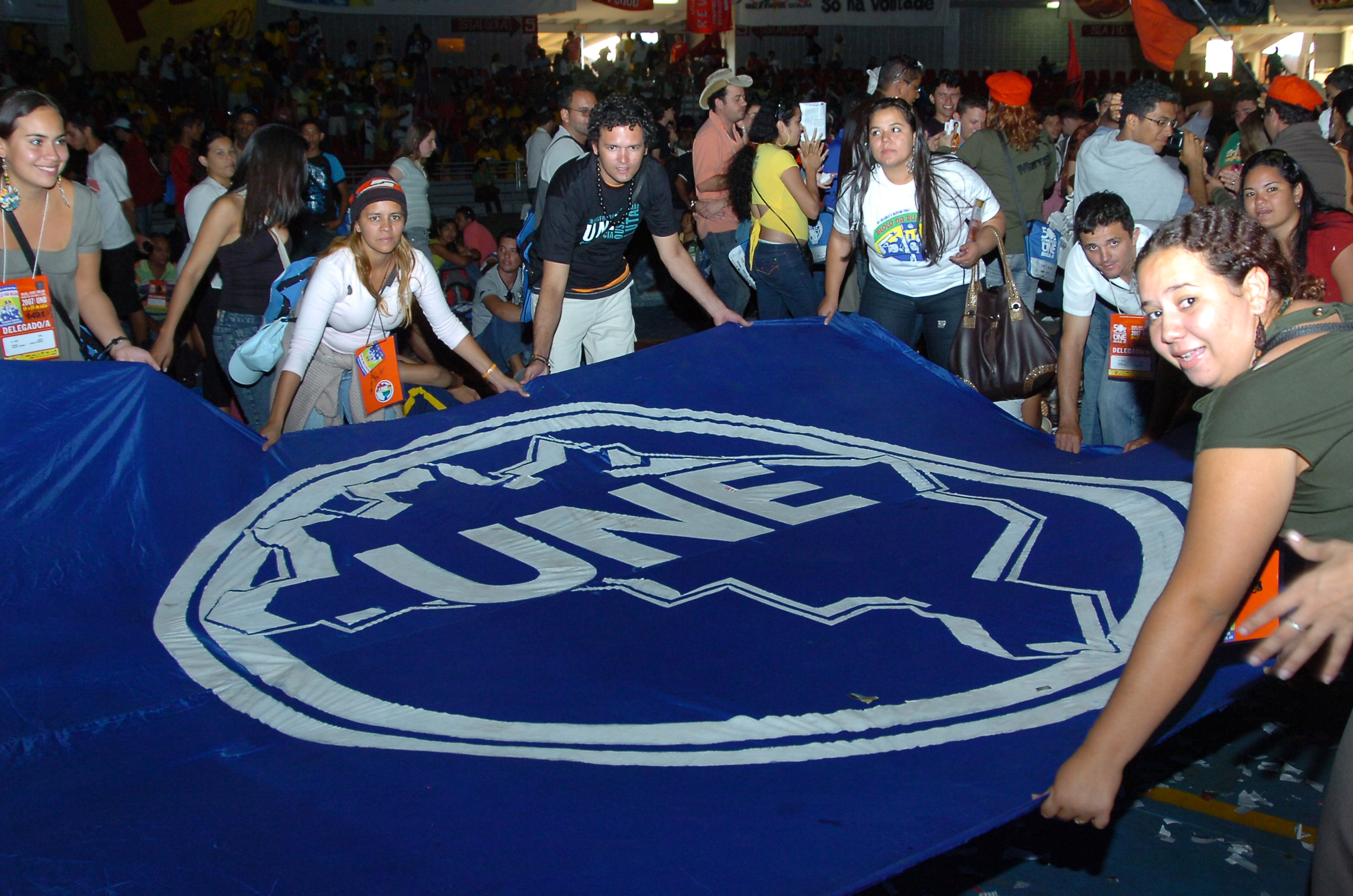 Estudantes fazem festa durante 50º Congresso da União Nacional dos Estudantes (UNE).